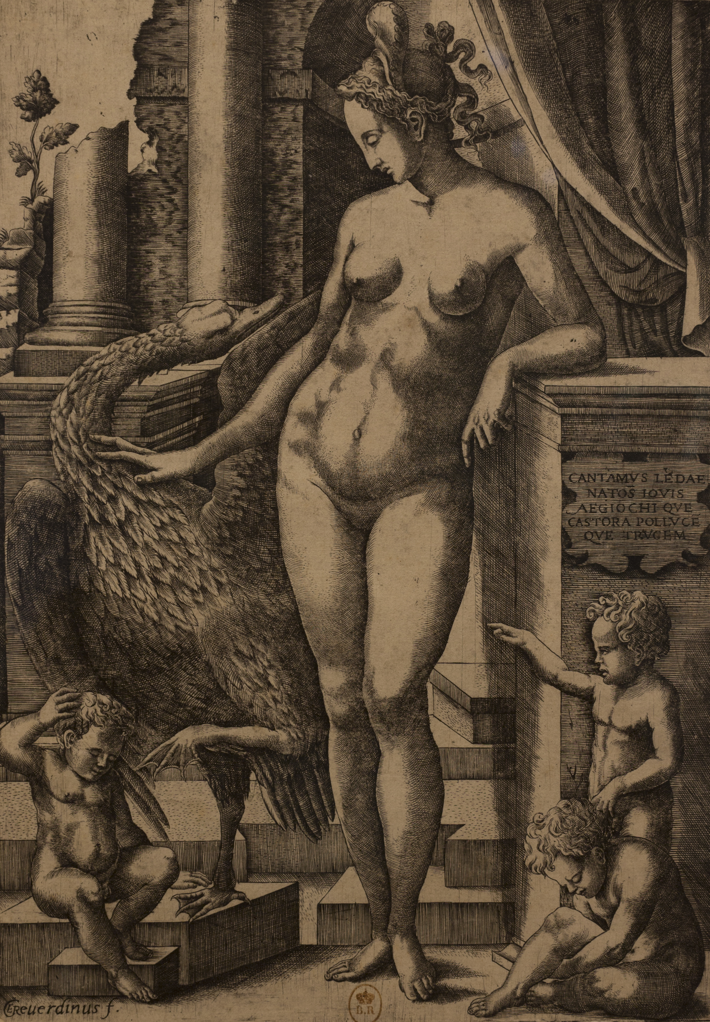 Léda debout. Burin. Signé en bas à gauche : GRreuerdinus f.